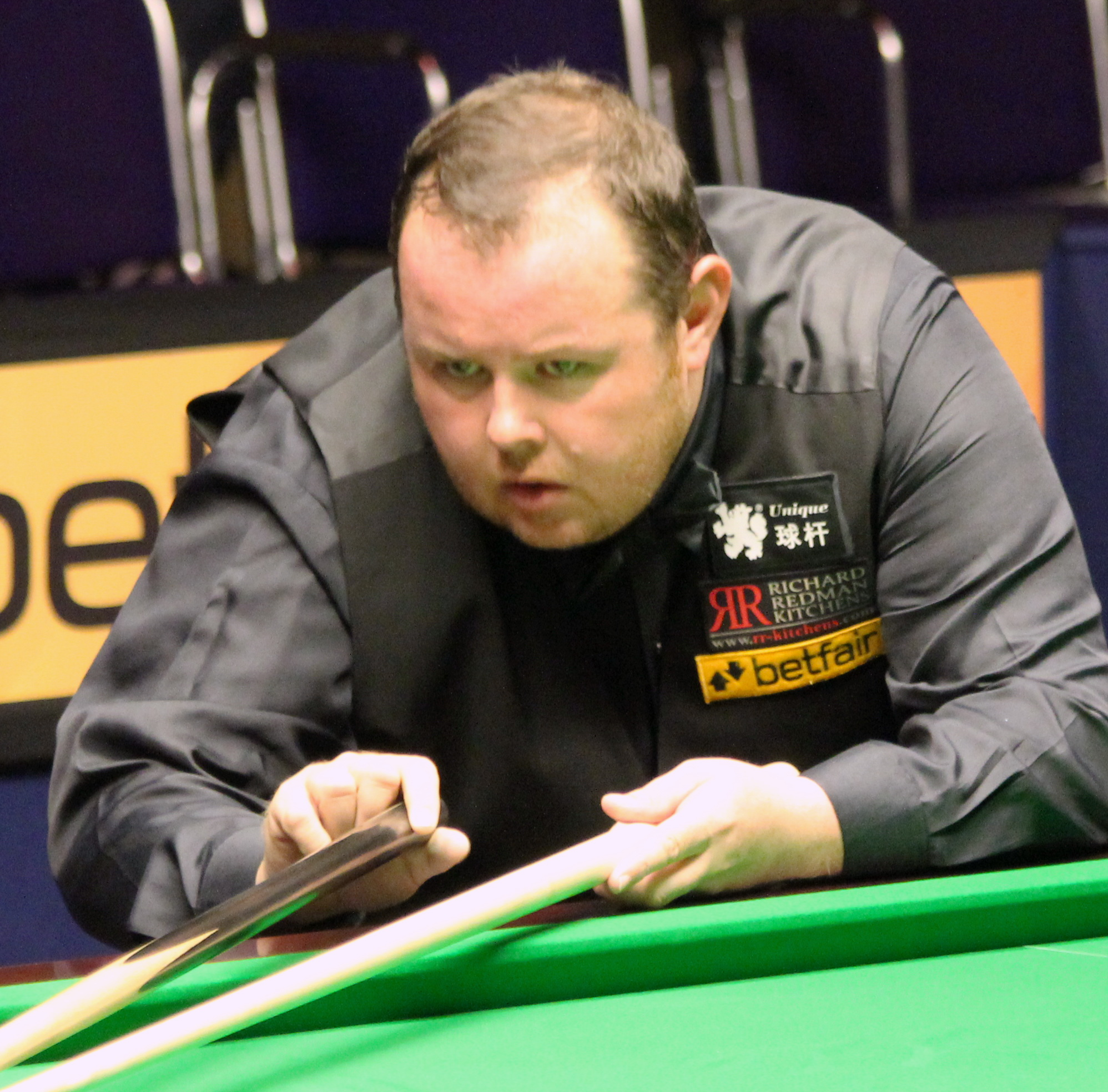 Stephen Lee beim Paul Hunter Classic 2012